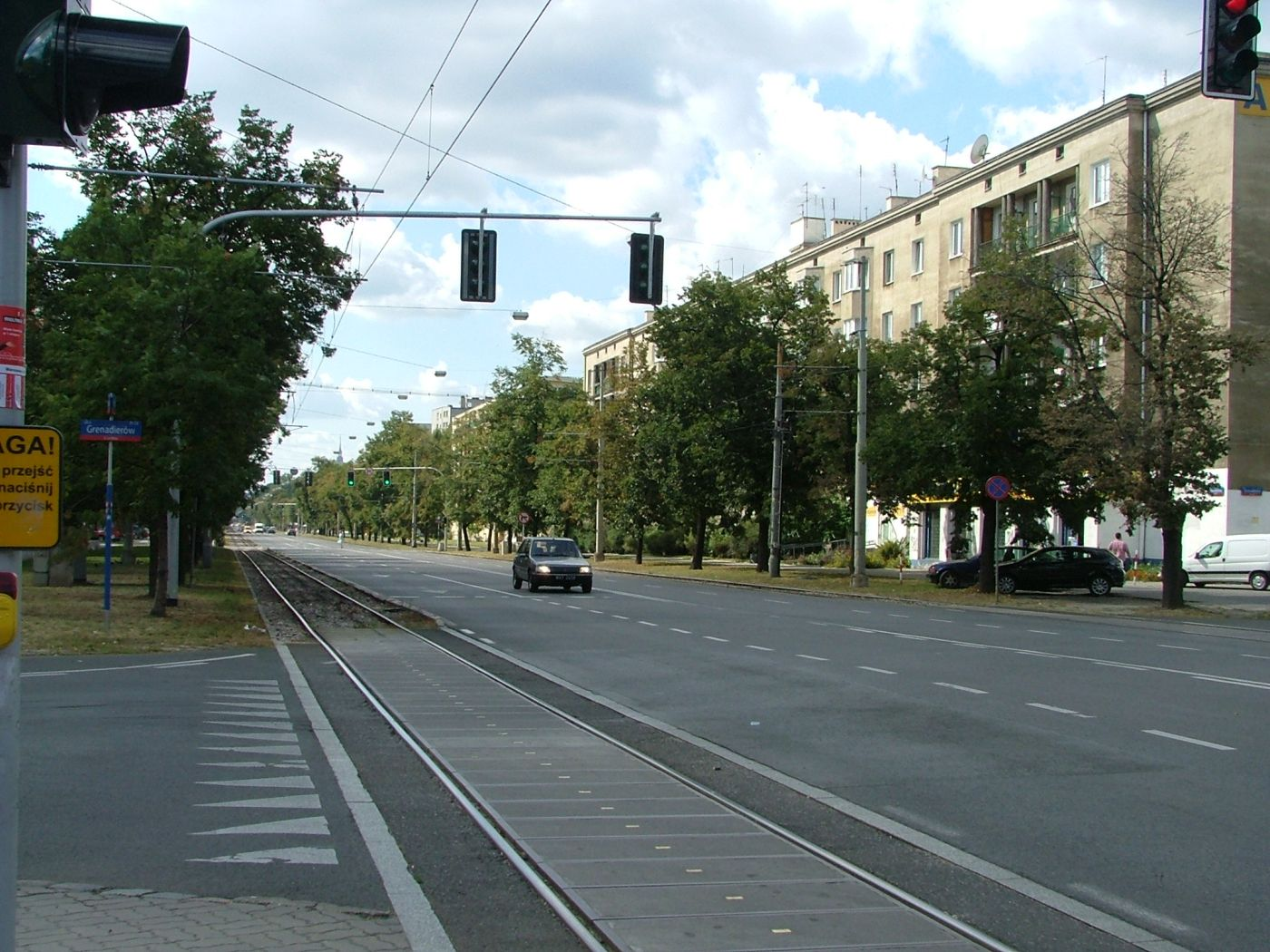 Polska, Warszawa, Praga Południe, Aleja Waszyngtona